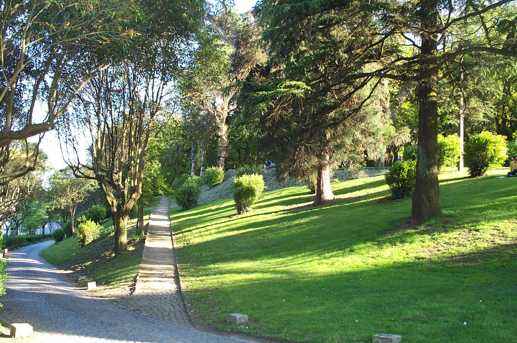 Alameda de Santiago de Compostela